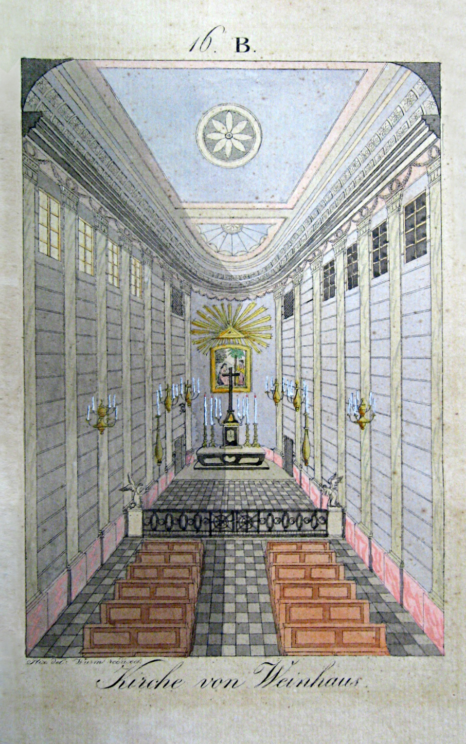 Kirche von Weinhaus im Czartoryskischlössel. Inv. 1873 / OGRT 71